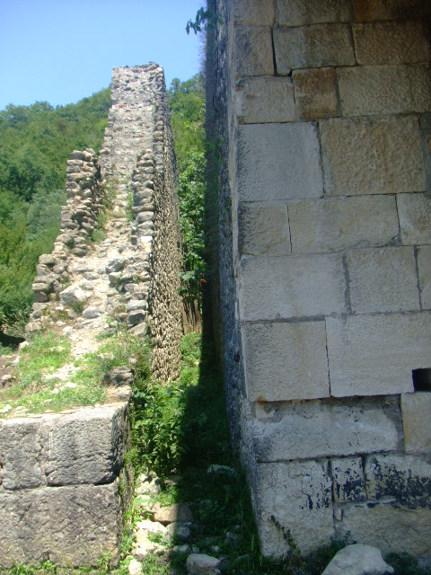 Nokalakevi